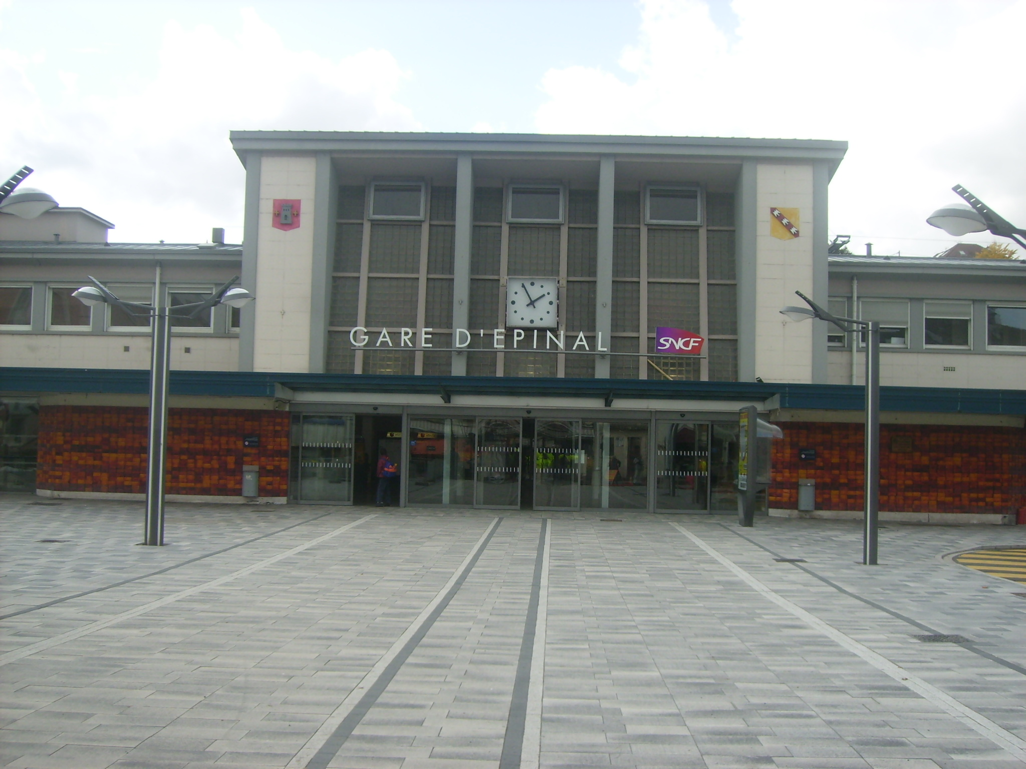 Facade de la gare d'épinal